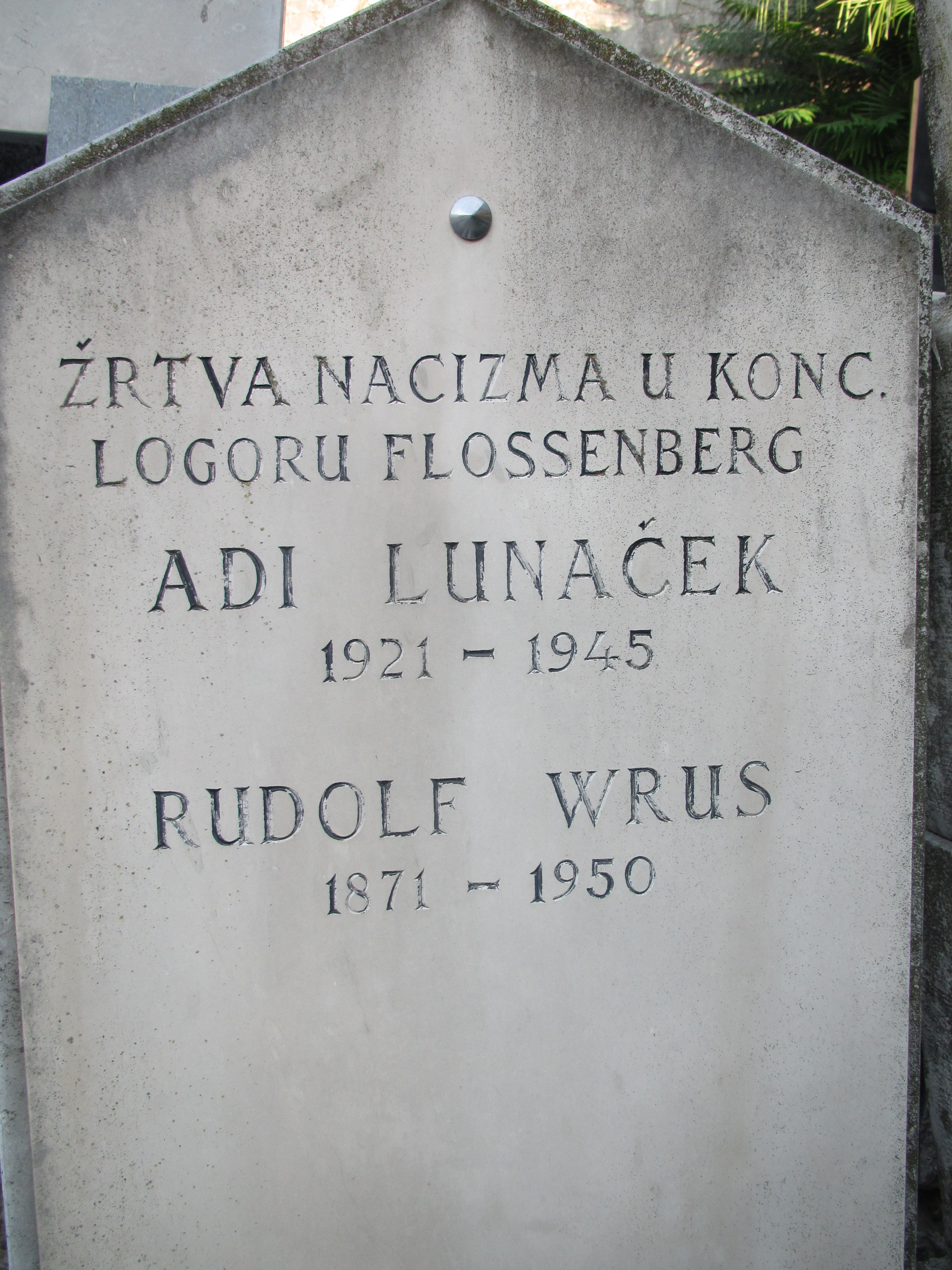 Slikano na Opatijskem pokopališču. Pokopališče se nahaja v Škrbičih in je bilo odprto 1903 leta. Grob se nahaja v vzhodnem delu pokopališča. In sicer na njegovem skrajnem robu.